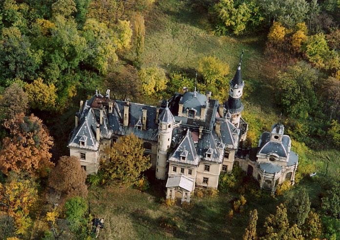 Palace - Tura - Hungary - Europe